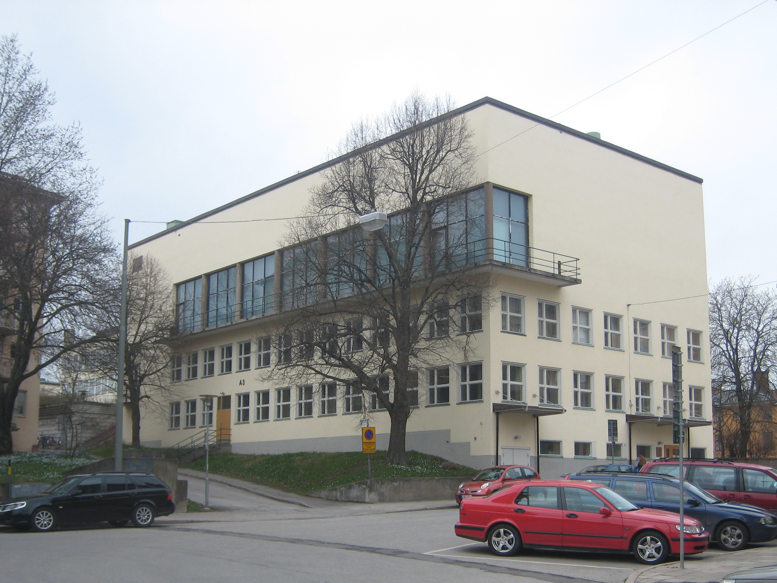 Zinkendammsskolan (today Globala gymnasiet). Architect Paul Hedqvist 1936.